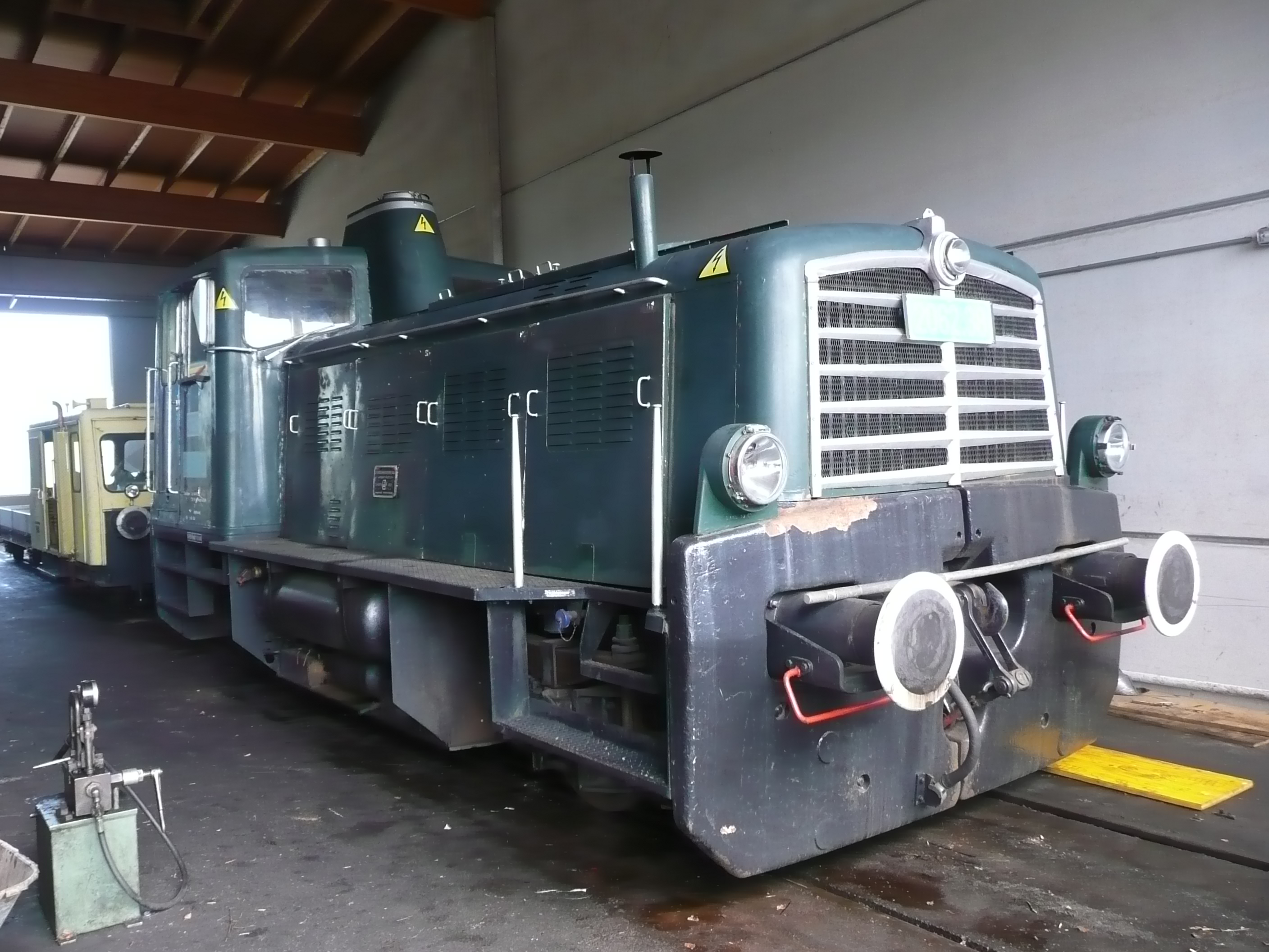 Lokomotive der ÖBB 2062 im Eisenbahnmuseum Ampflwang